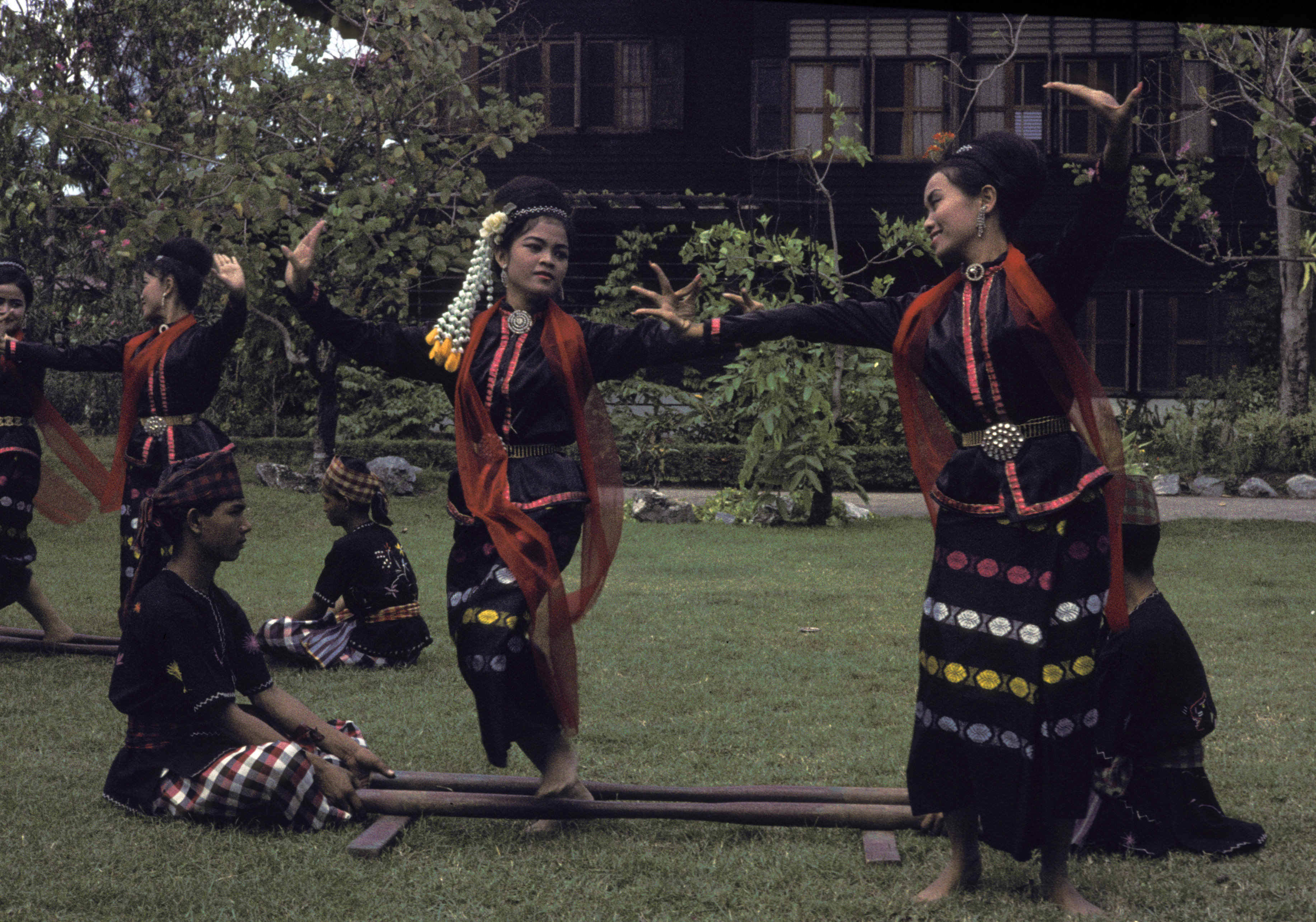 Bangkok, Thailand